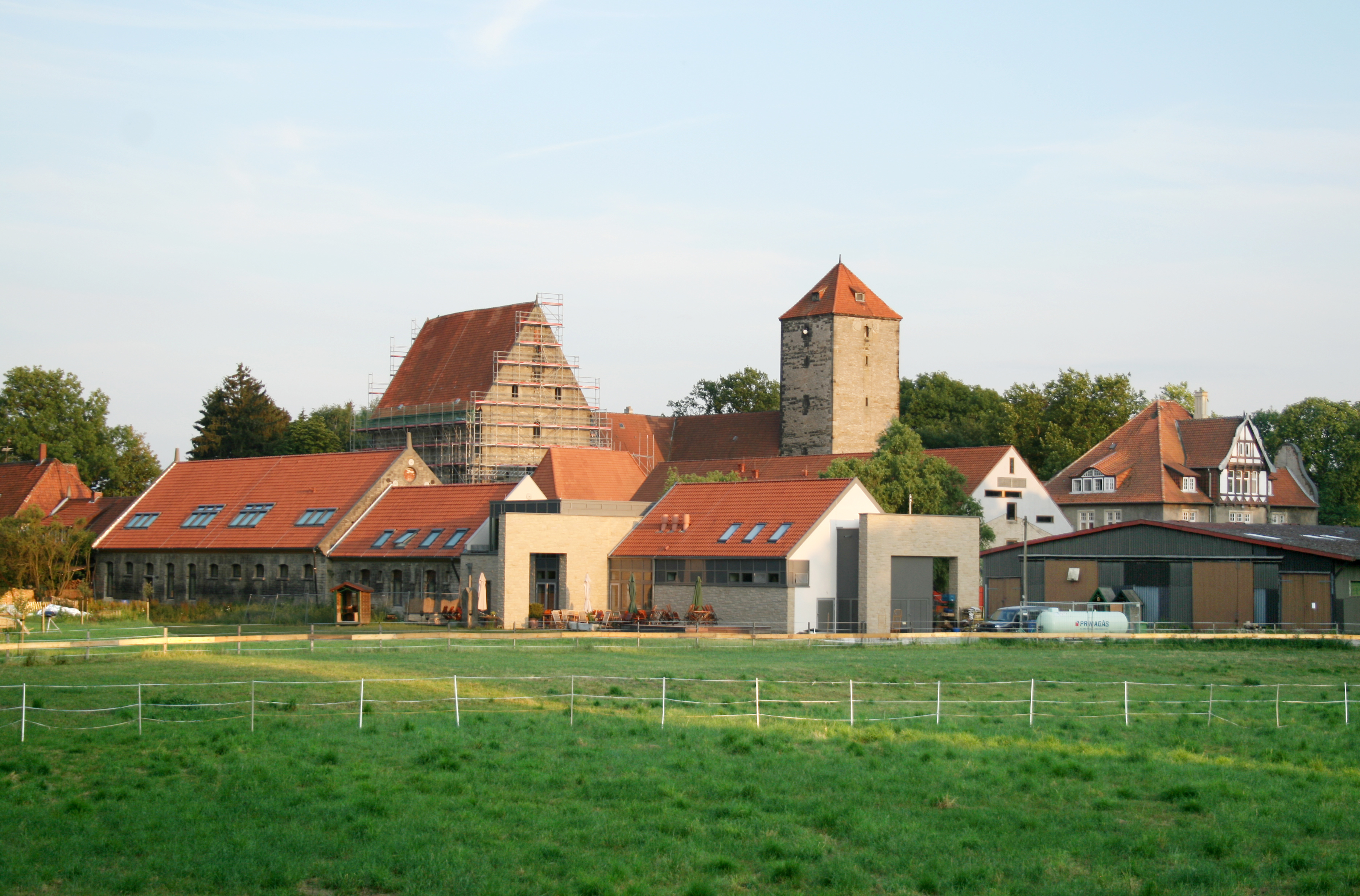 Kulturcampus Domäne Marienburg der Stiftung Universität Hildesheim (Juni 2011)